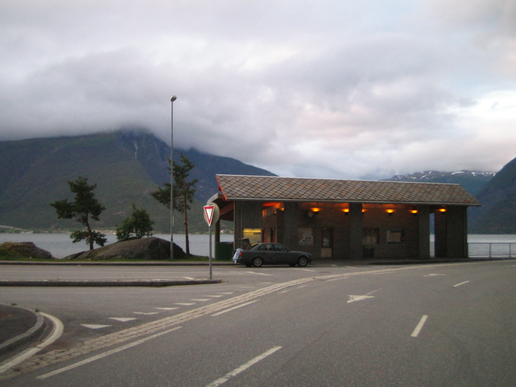 Mannheller ferje kai en sommernatt.